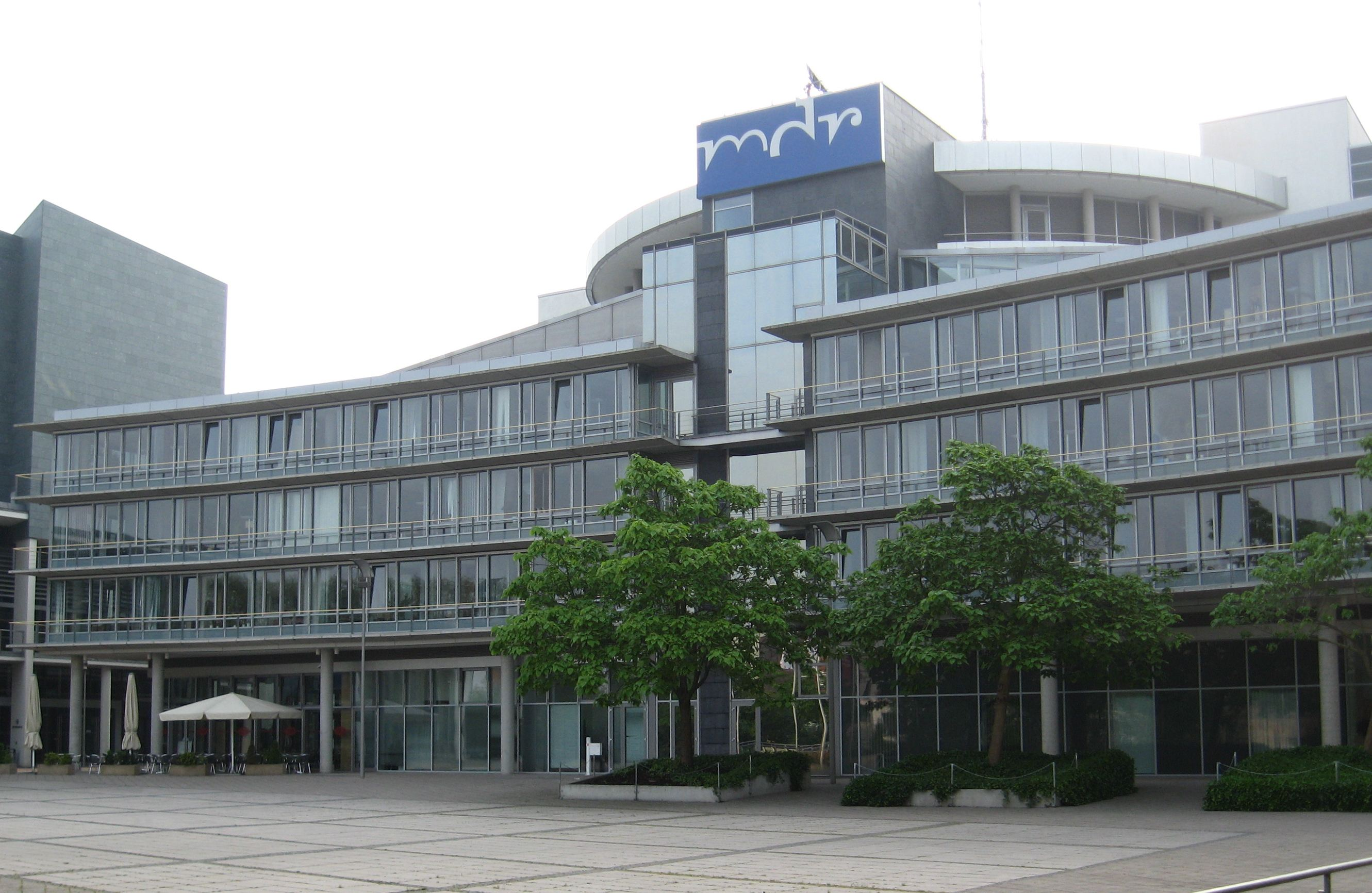 Hörfunkzentrale des MDR in Halle (Saale). - OpenStreetMap(Info)